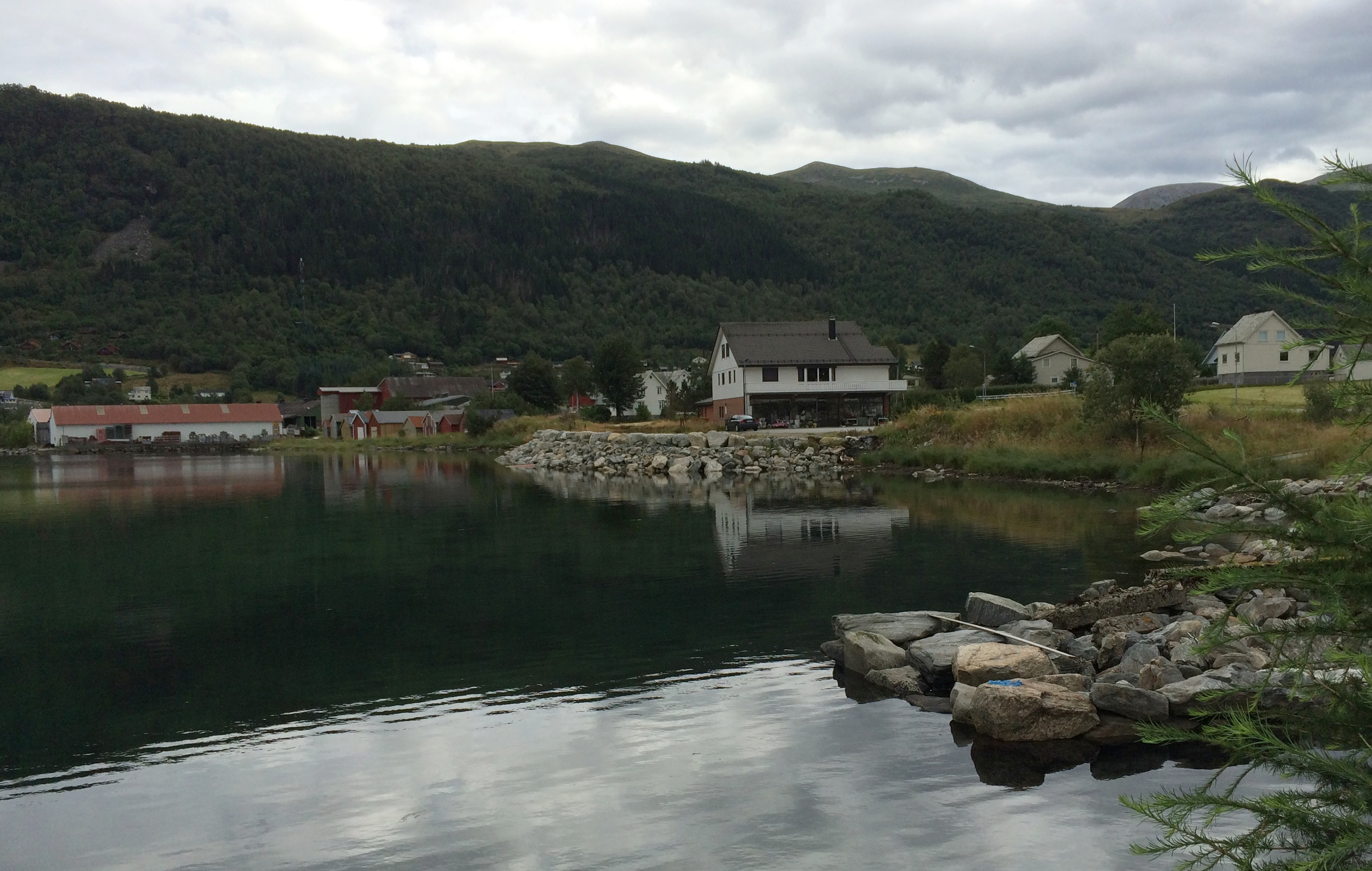 Fra Syvde i Vanylven